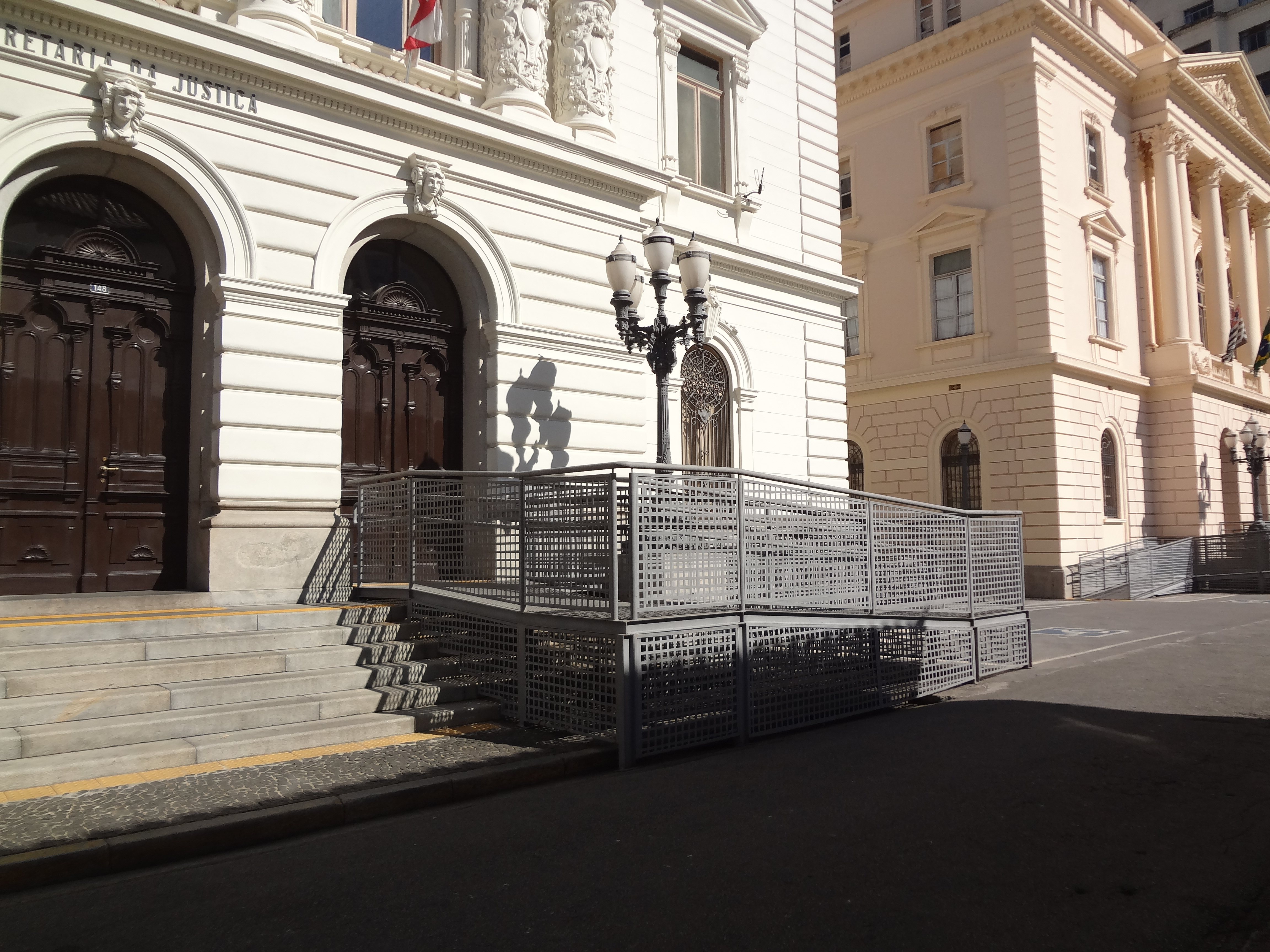 Acesso à cadeirantes no Edifício da Secretaria da Justiça, antiga Secretaria da Agricultura e da Fazenda.